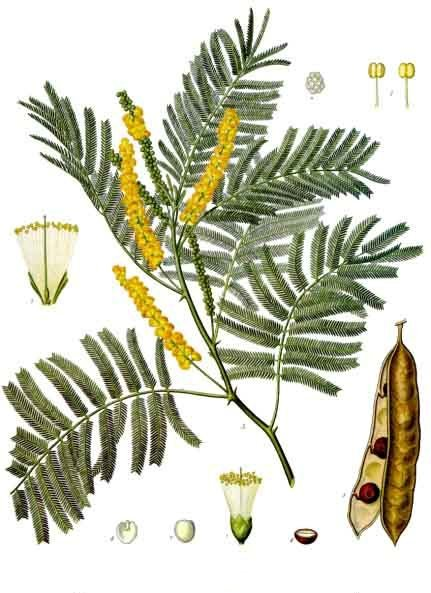 Catechu-Acacie. A blühender Zweig, nat. Grösse; 1 Blüthe, vergrössert; 2 dieselbe im Längsschnitt, desgl.; 3 Staubgefässe von verschiedenen Seiten, desgl.; 4 Pollenmasse, desgl.; 5 Frucht, nat. Grösse; 6 Same zerschnitten, desgl.; 7 und 8 Embryo von aussen und innen, desgl.